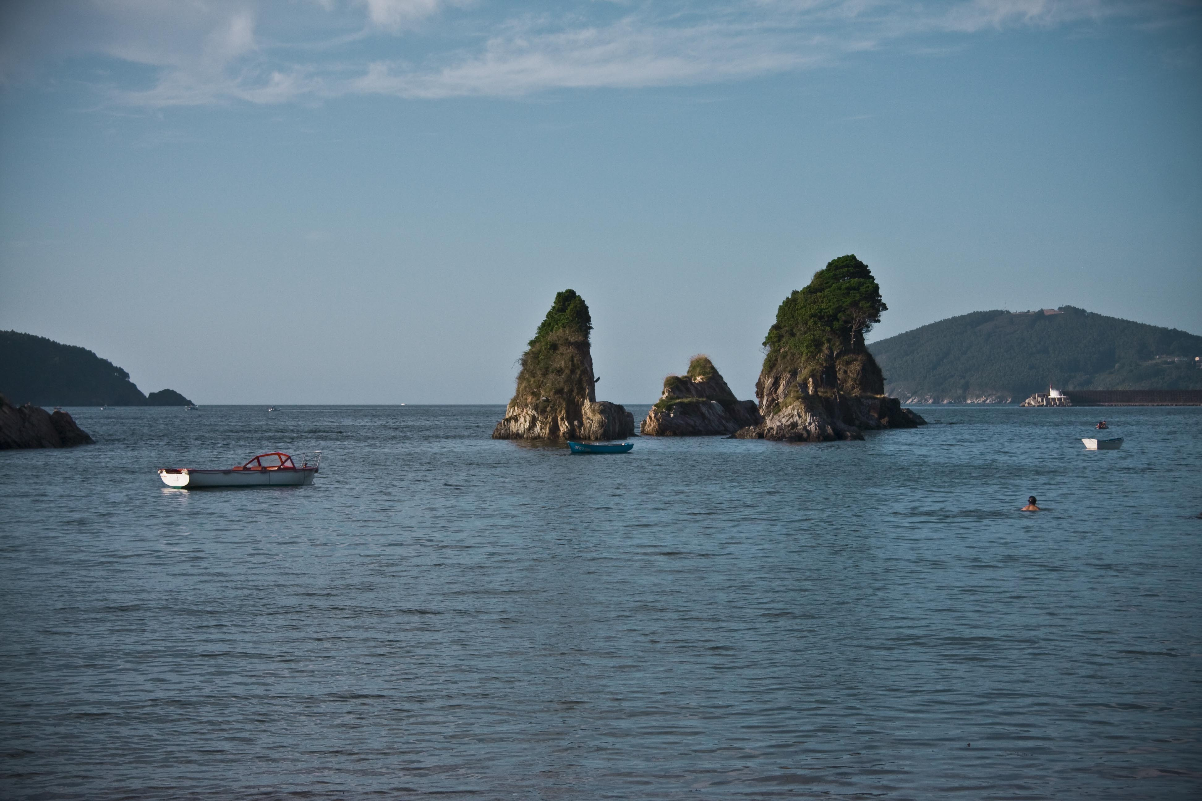 Penas fronte á praia de Covas, Viveiro, Galiza; á dereita, o malecón de Celeiro.